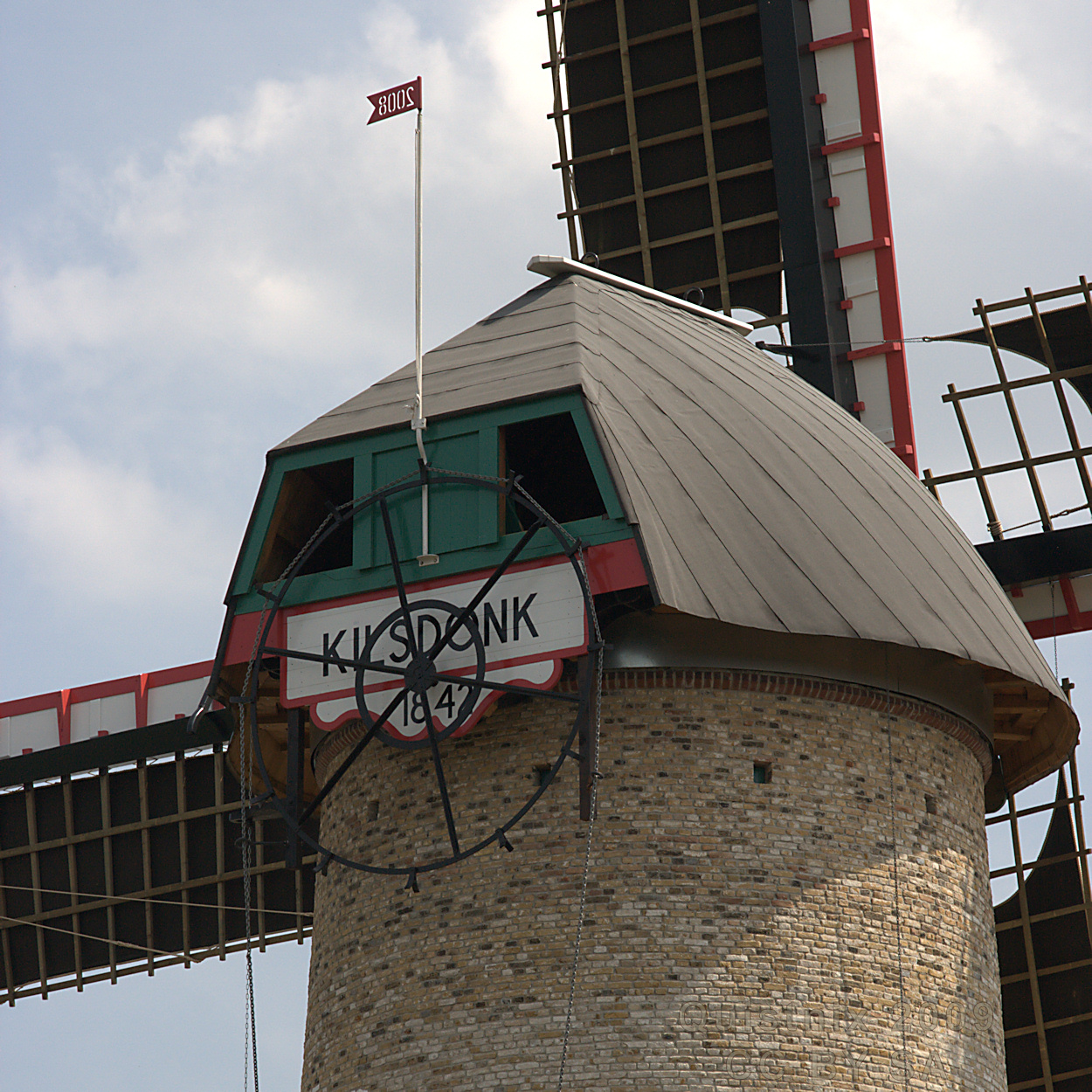 Kilsdonkse Molen tijdens de opening voor het publiek - detailfoto kettingkruiwerk